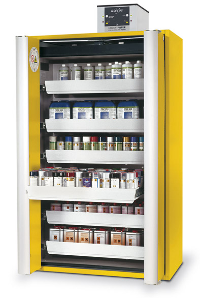 Sicherheitsschrank zur sicheren Lagerung von Gefahrstoffen und brennbaren Chemikalien